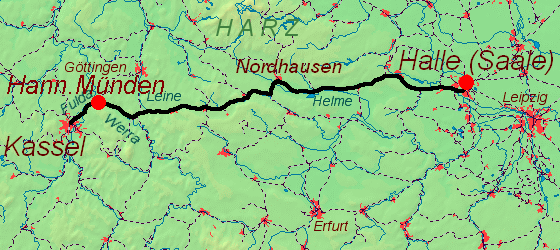 Lage der Halle-Kasseler Eisenbahn ueberarbeitet